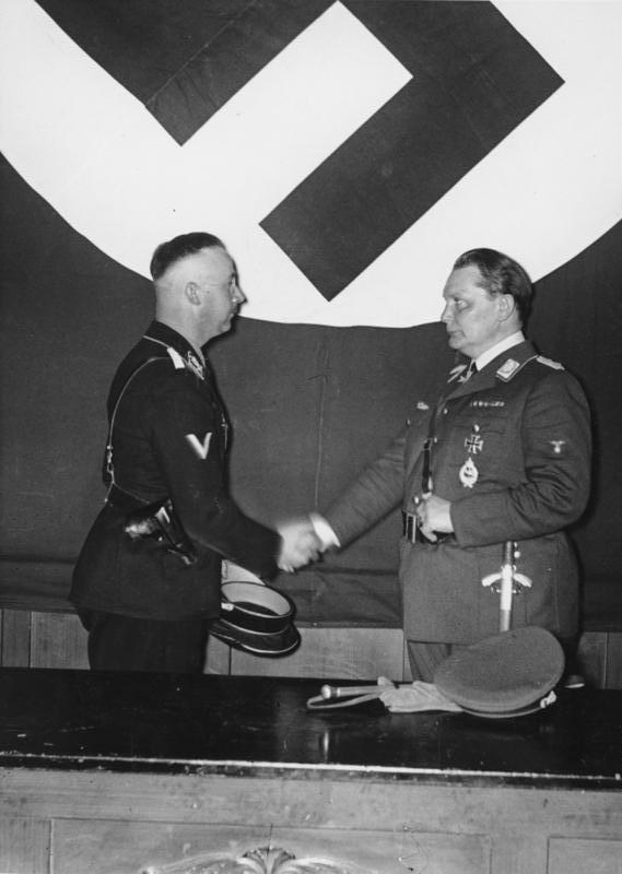 Berlin, Hermann Göring ernennt Himmler zum Leiter der Gestapo Scherl: SS-Reichsführer Himmler zum Leiter des Geheimen Staatspolizeiamtes ernannt Ministerpräsident Göring verpflichtet SS-Reichsführer Himmler auf sein neues Amt. [Berlin.- Ernennung von Heinrich Himmler (links) durch Hermann Göring, im Hintergrund Hakenkreuz-Flagge, April 1934] Abgebildete Personen: Göring, Hermann: Reichsmarschall, Oberbefehlshaber der Luftwaffe, Ministerpräsident von Preußen, Deutschland Himmler, Heinrich: Reichsführer der SS, Deutschland (GND 11855123X)